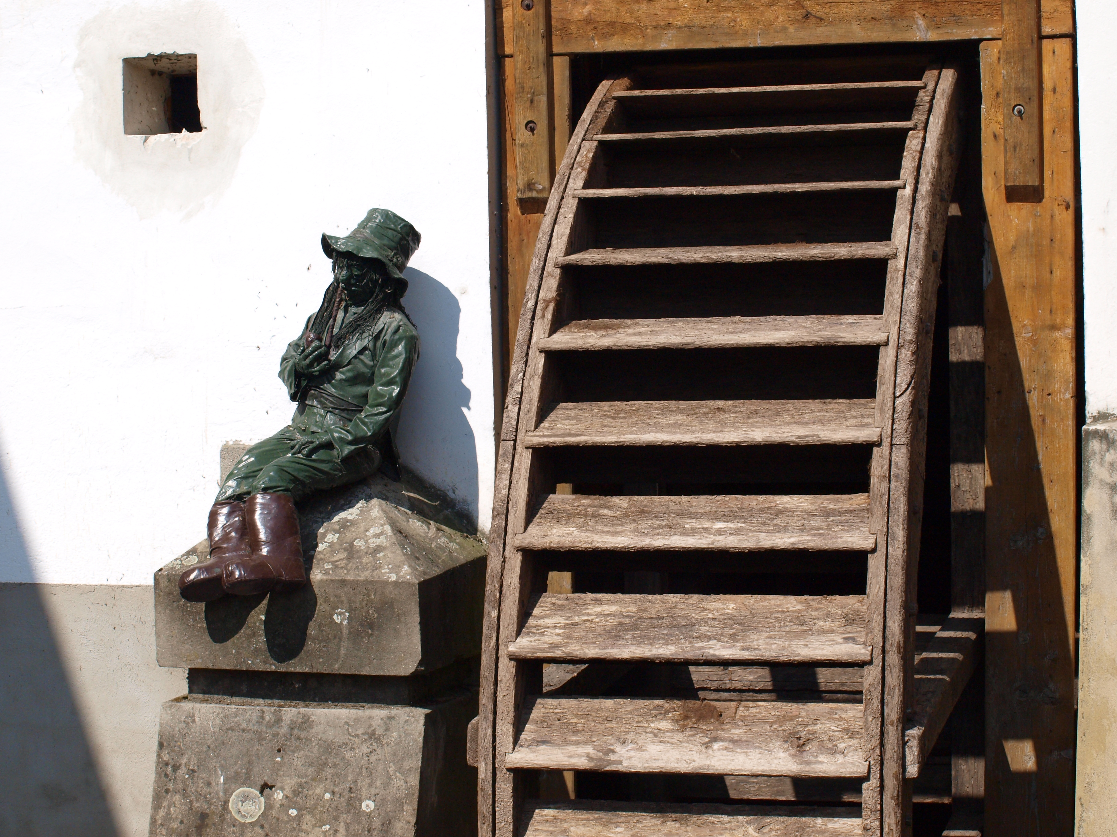 mlýnské kolo hlídá vodník